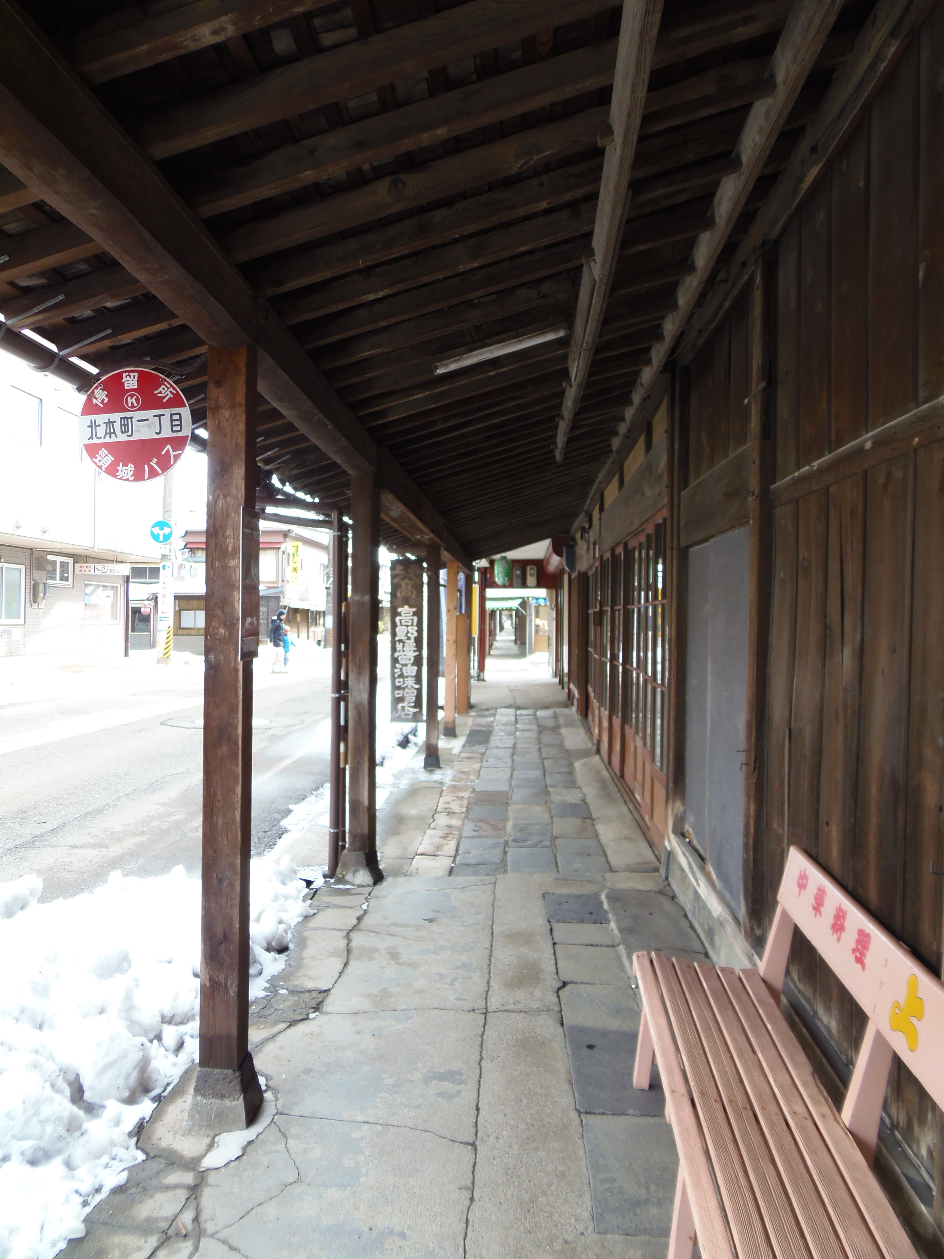 雁木通り（新潟県上越市北本町 高野醤油味噌店付近）